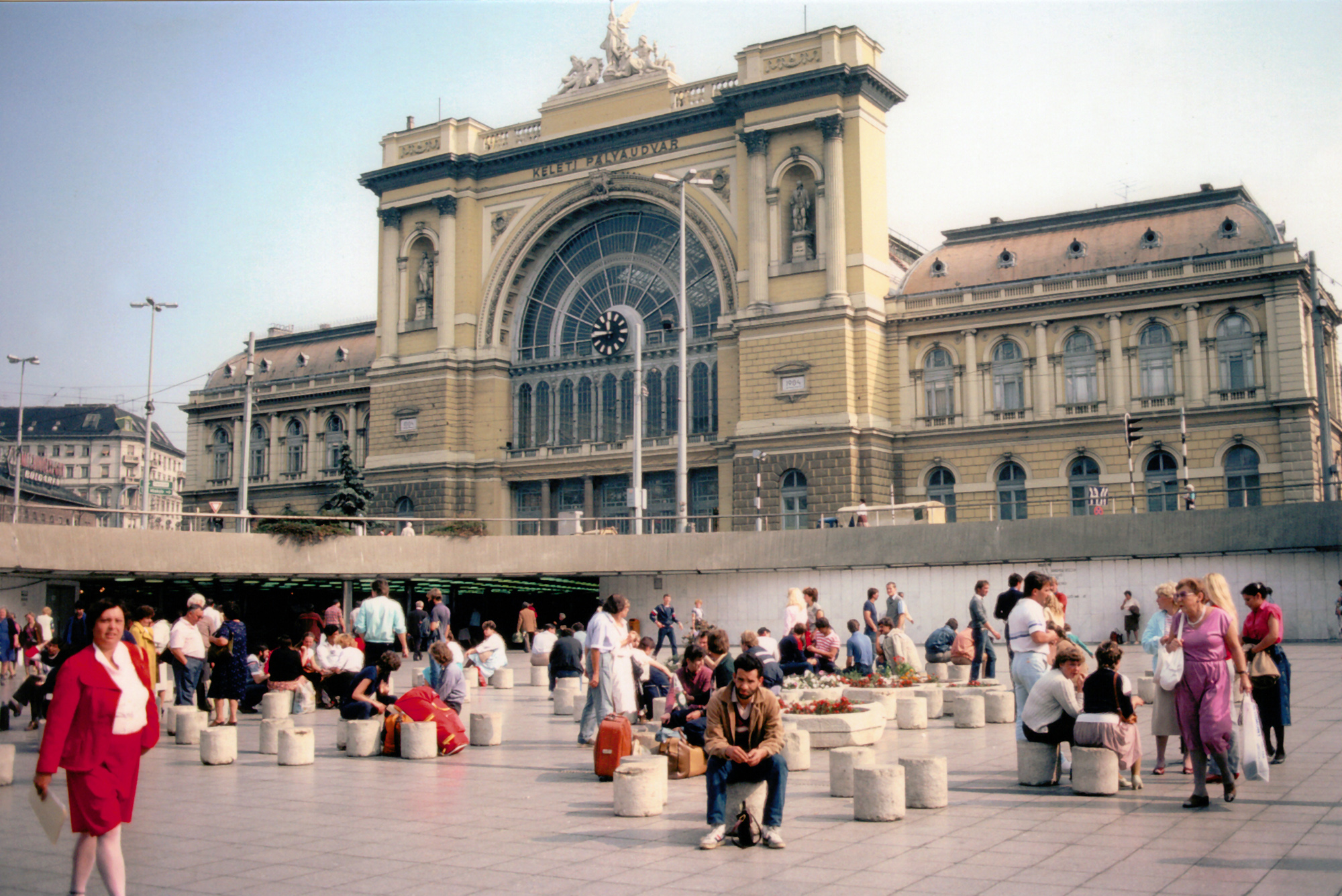 Budapest Keleti pályaudvar felvételi épülete